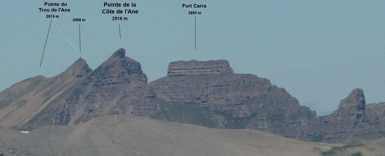 Chaînon de la Côte de l'Ane au nord-ouest du département des Alpes-Maririmes (06 - FRANCE). Photographie prise au téléobjectif depuis la Dreccia (station de Valberg) à 23 km au sud-est.